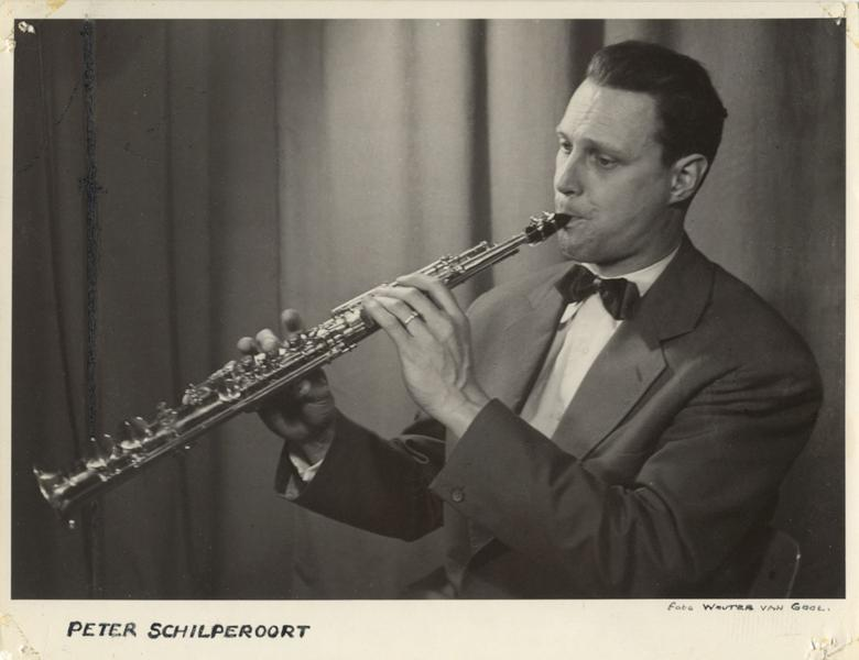 нідерландський джазовий музикант Петер Схілпероорт